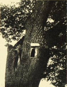 Беларуская (тарашкевіца): Выгляд борці ў старадаўняй ліпе